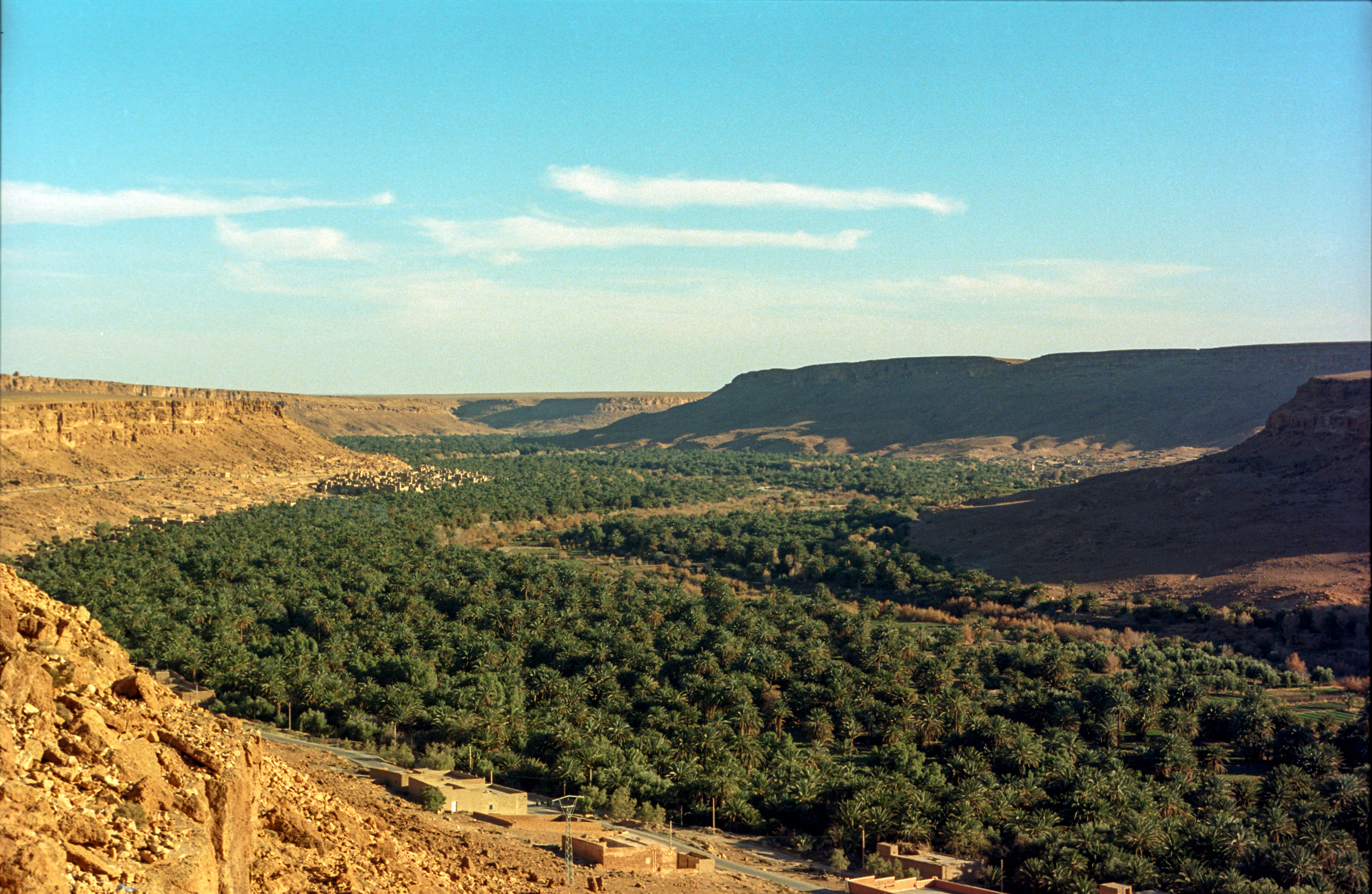 Dolina rzeki Ziz